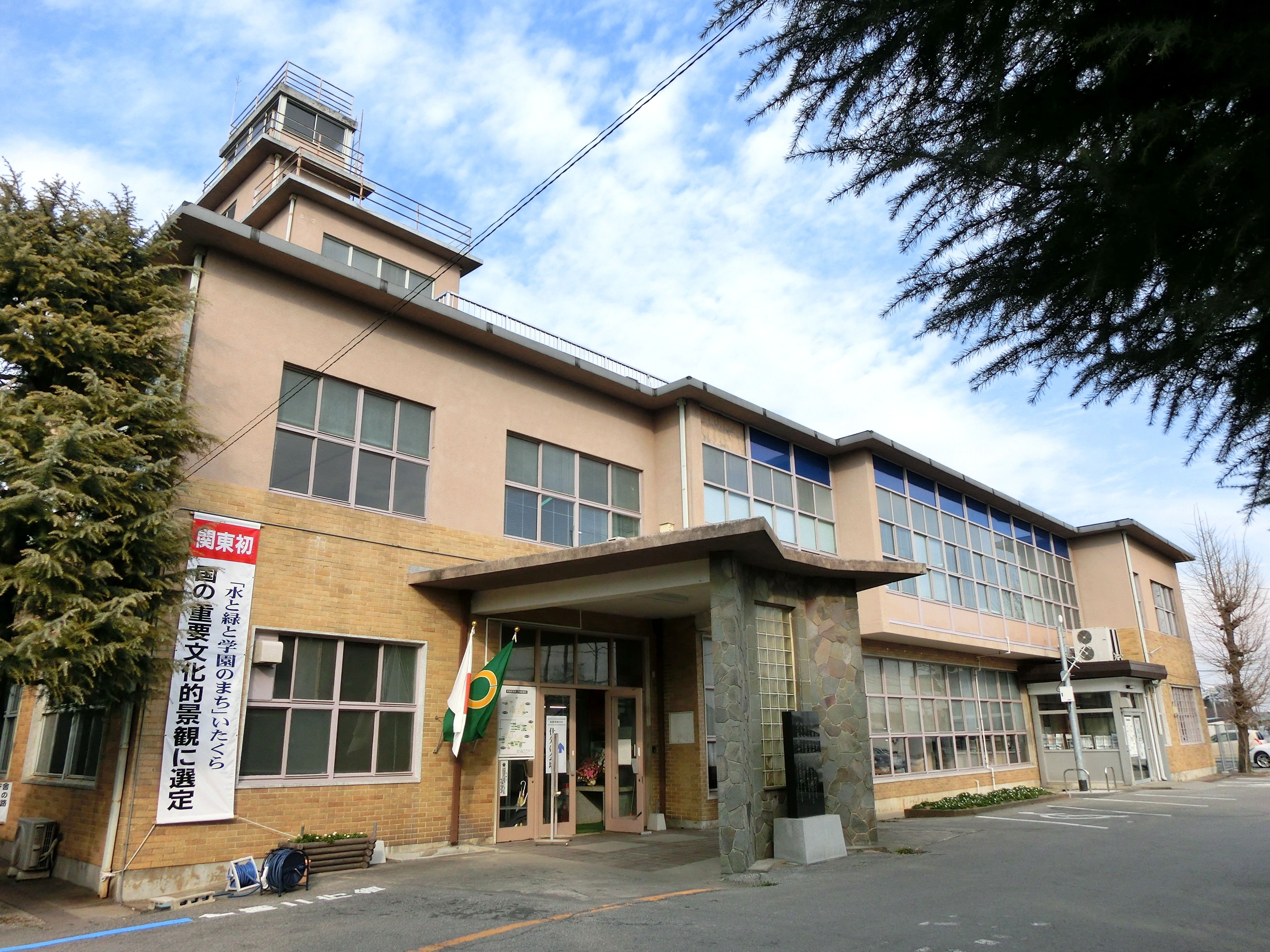 板倉町役場